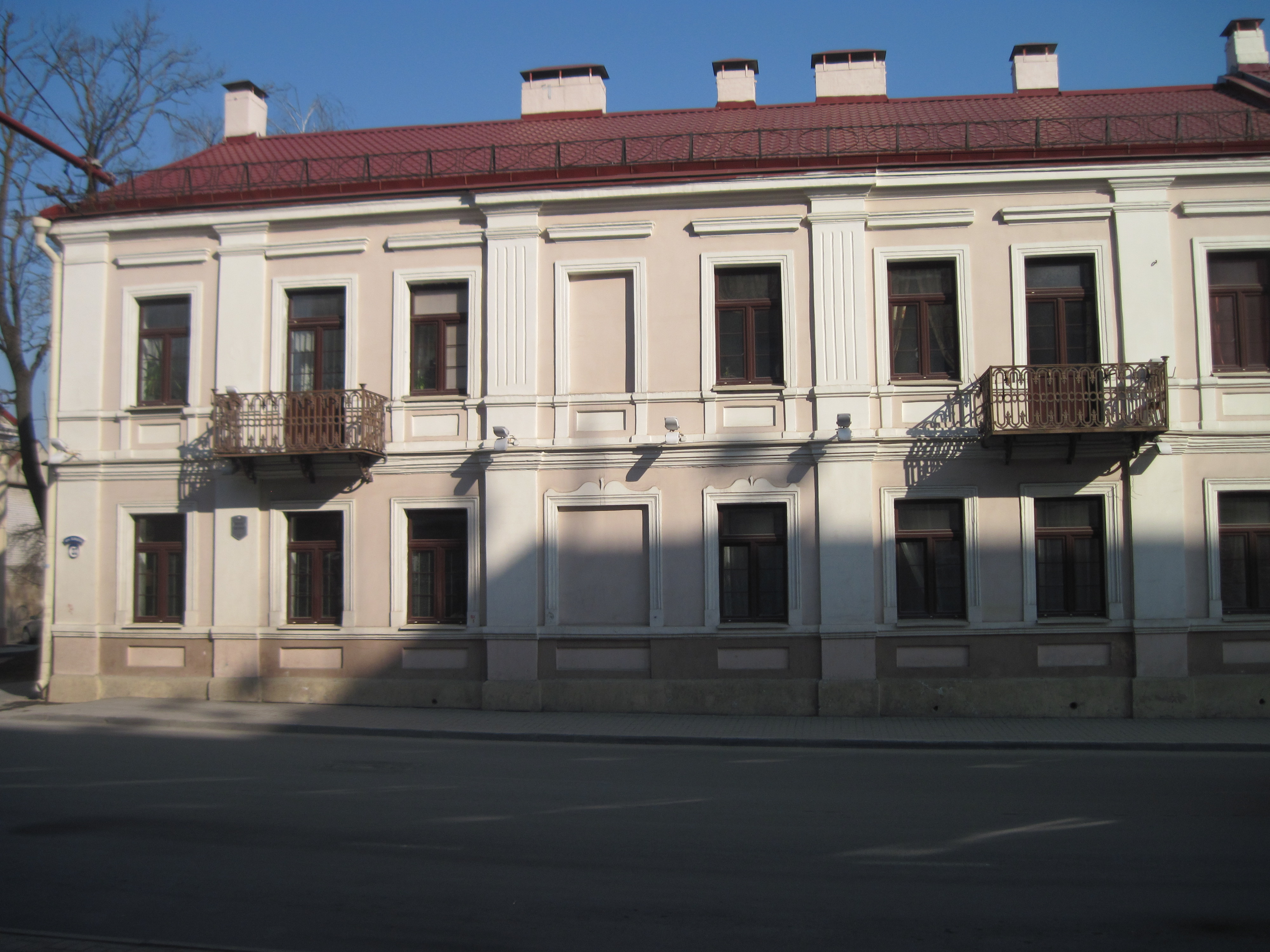 Забудова гістарычнага цэнтра Гродна. Вуліца К. Маркса, 32